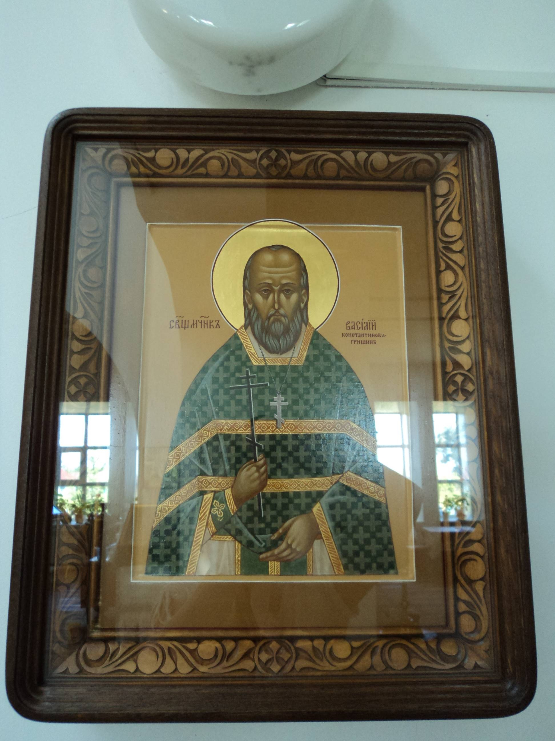 Икона, посвященная священномученику Василию Константинову-Гришину